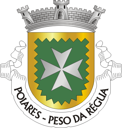 Brasão de armas de Poiares-Peso da Régua